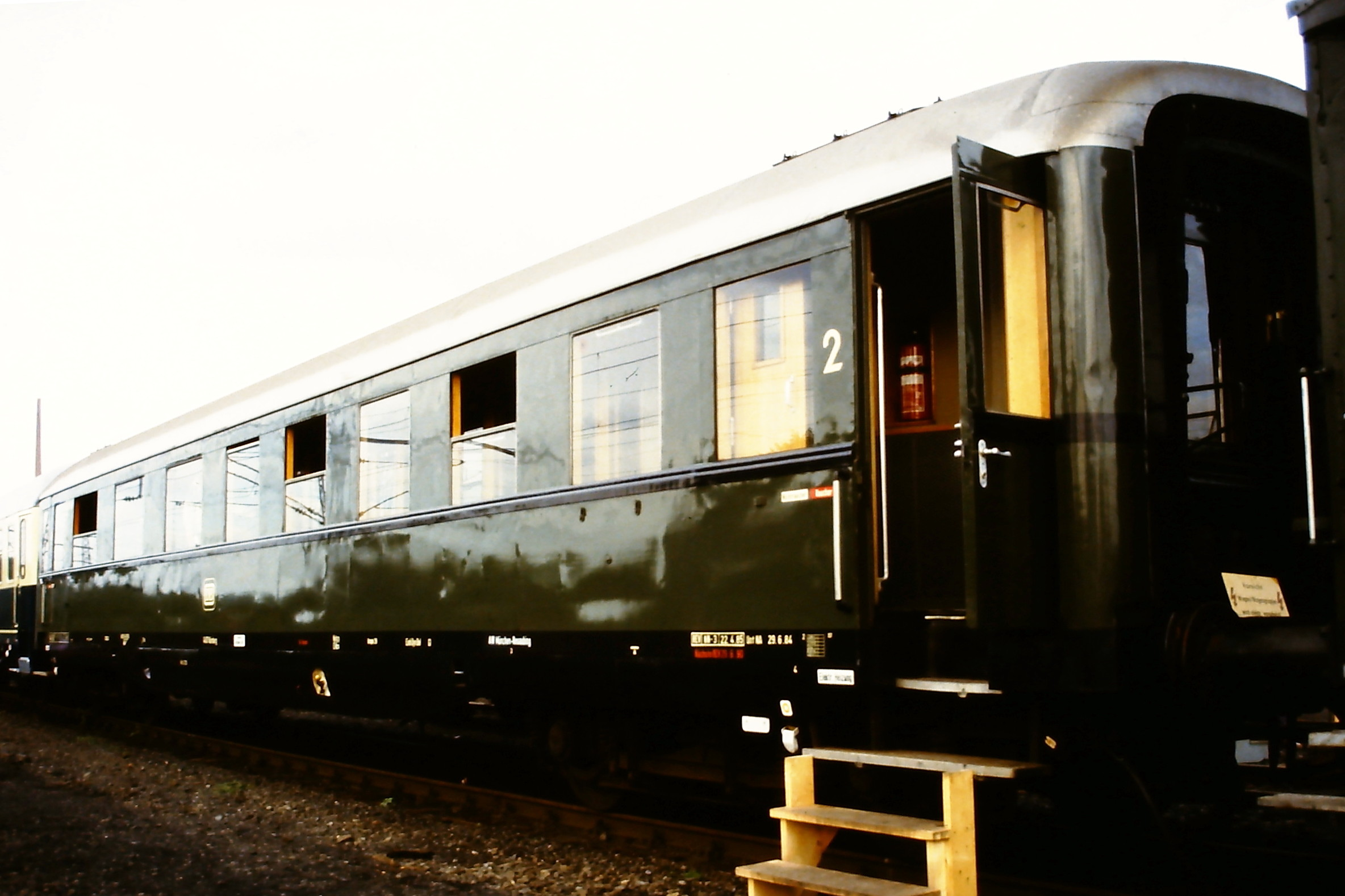 ABü 336 (Schürzenwagen), ausgestellt auf der Fahrzeugschau 150 Jahre deutsche Eisenbahn in Bochum-Dahlhausen